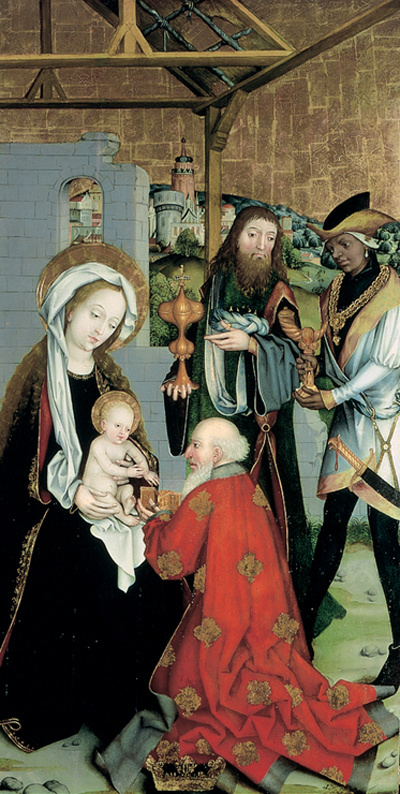 Jörg Stocker und Martin Schaffner Anbetung der Könige, um 1500, Öl auf Holz